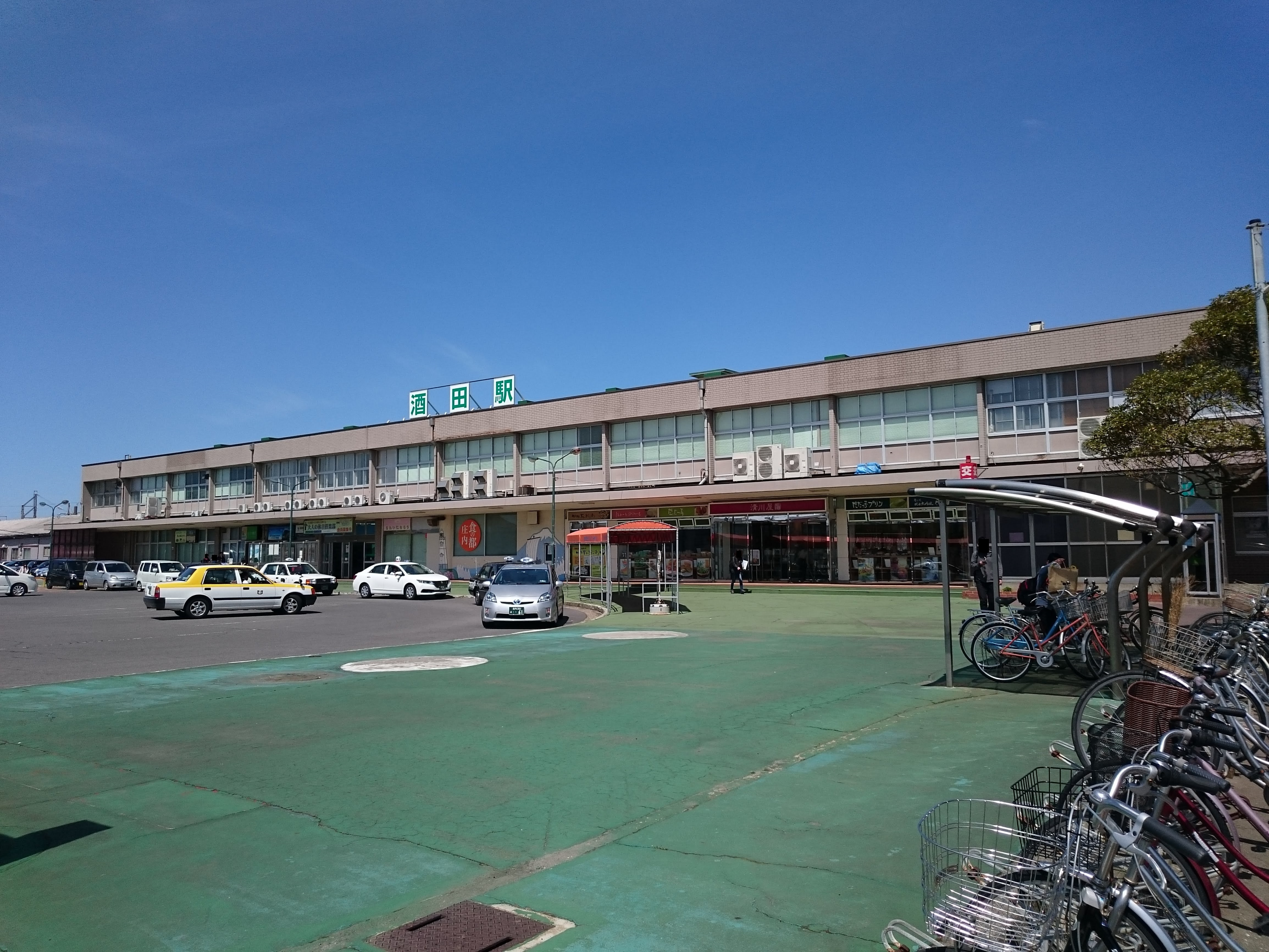 酒田駅の駅舎外観